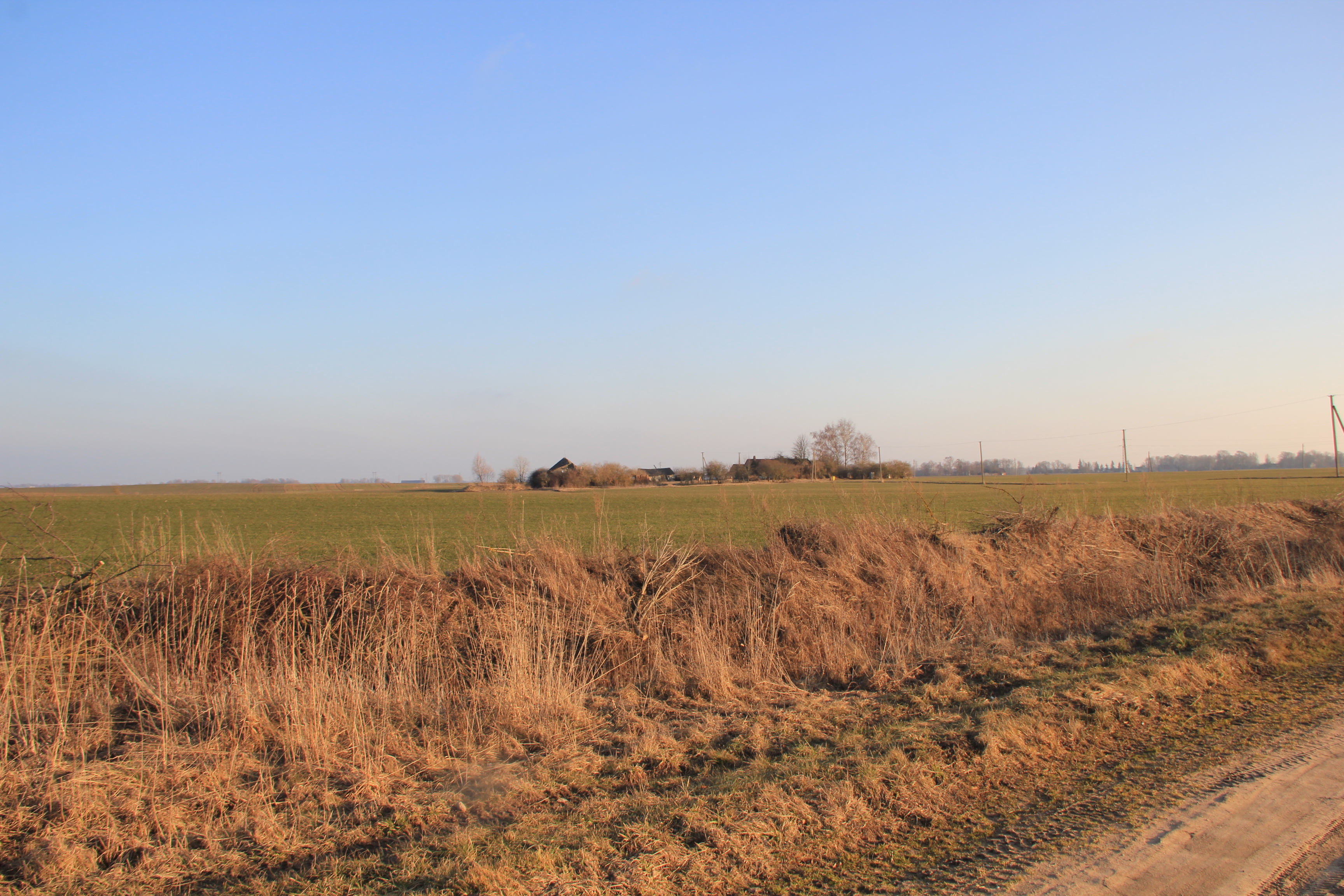 Goesų valdos 2016 m.